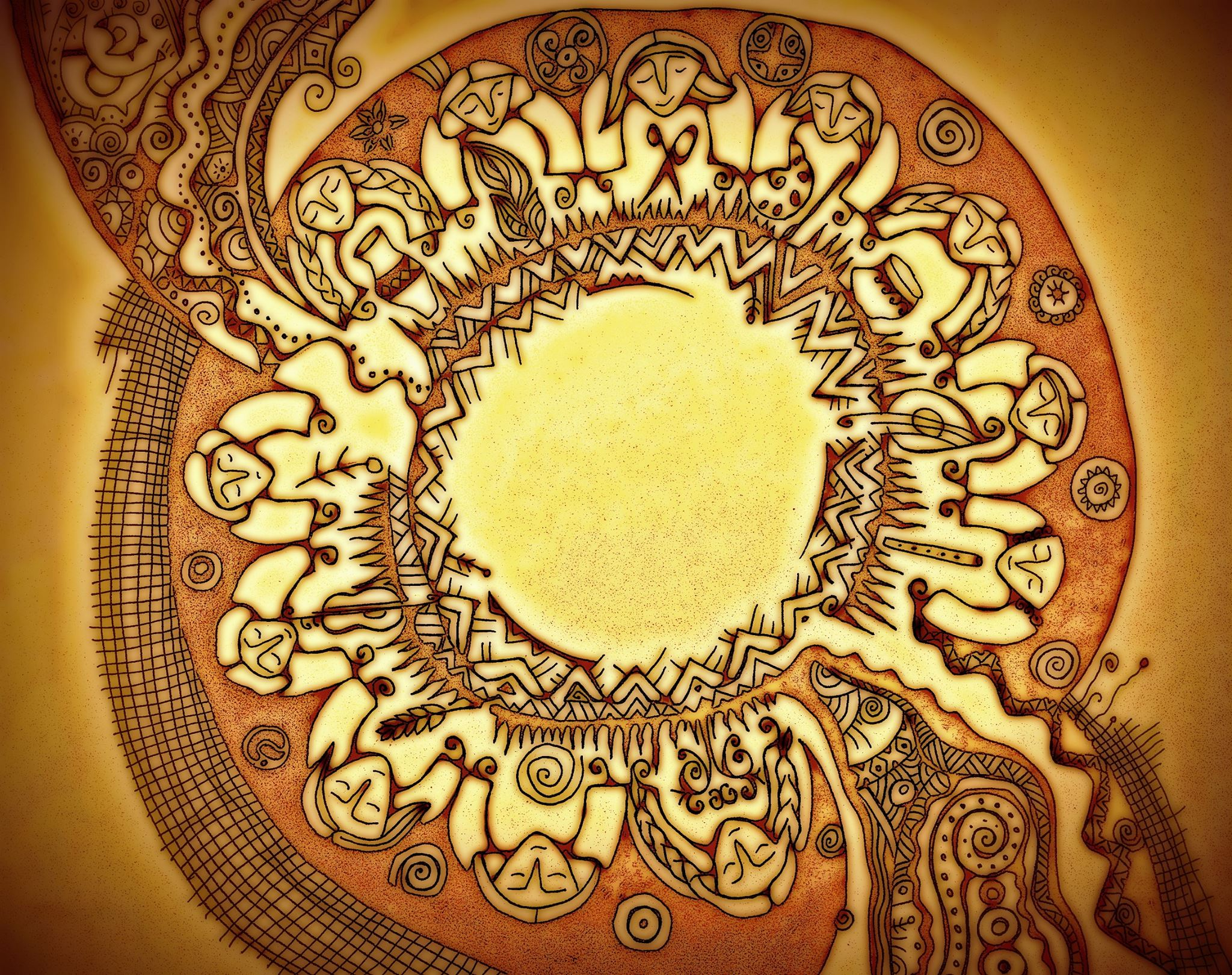 графіка в авторській техніці Олени Пригоди